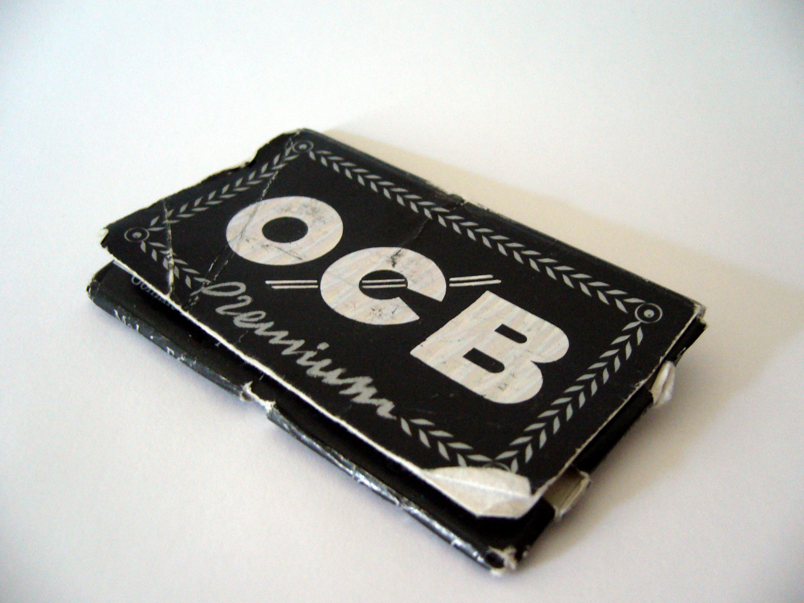 Papier OCB